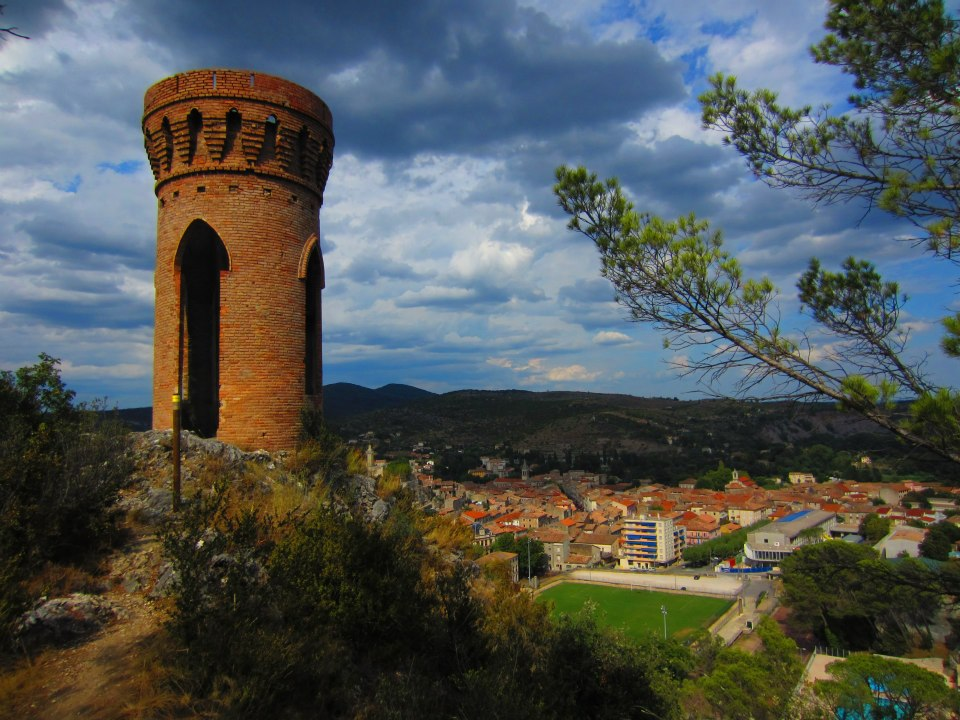 Saint-Ambroix, Gard.